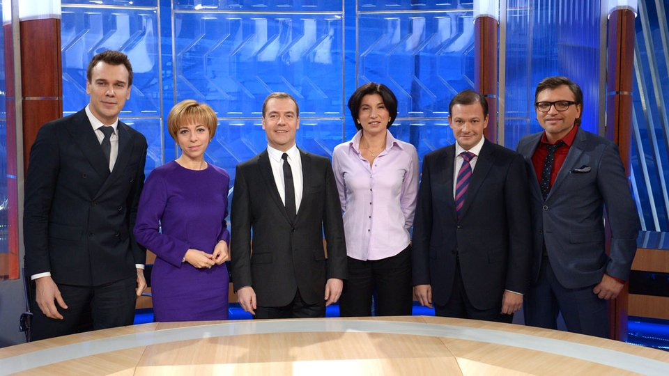 Традиционное интервью Дмитрия Медведева, посвящённое итогам работы Правительства в уходящем году. Свои вопросы задали телеведущие Ирада Зейналова («Первый канал»), Сергей Брилёв (ВГТРК), Марианна Максимовская («Рен ТВ»), Вадим Такменёв (НТВ) и Михаил Зыгарь («Дождь»).